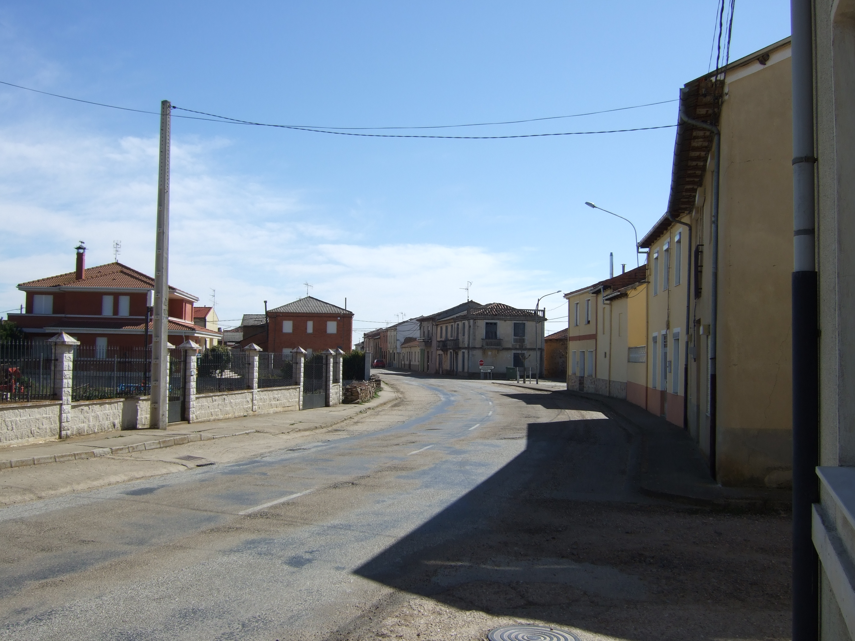 Calle en Palacios de la Valduerna (León, España).